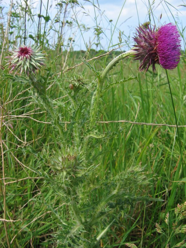 Nickende Distel (Carduus nutans), Gragetopshof